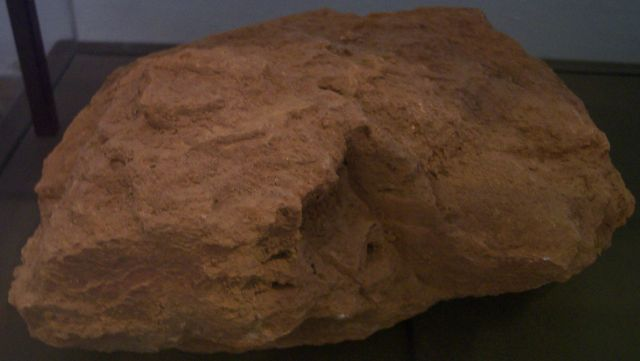 Bauxit, eigenes Foto